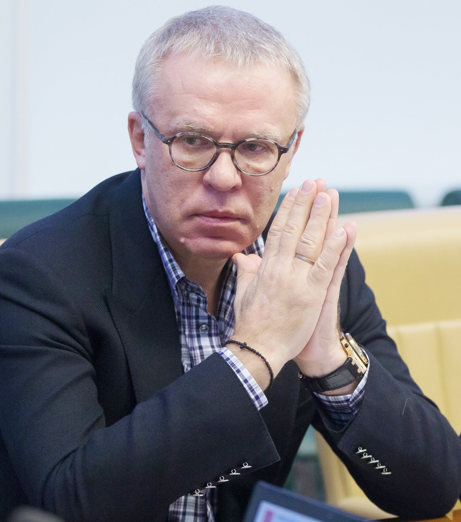 Вячеслав Александрович Фетисов (род. 1958) — российский деятель спорта